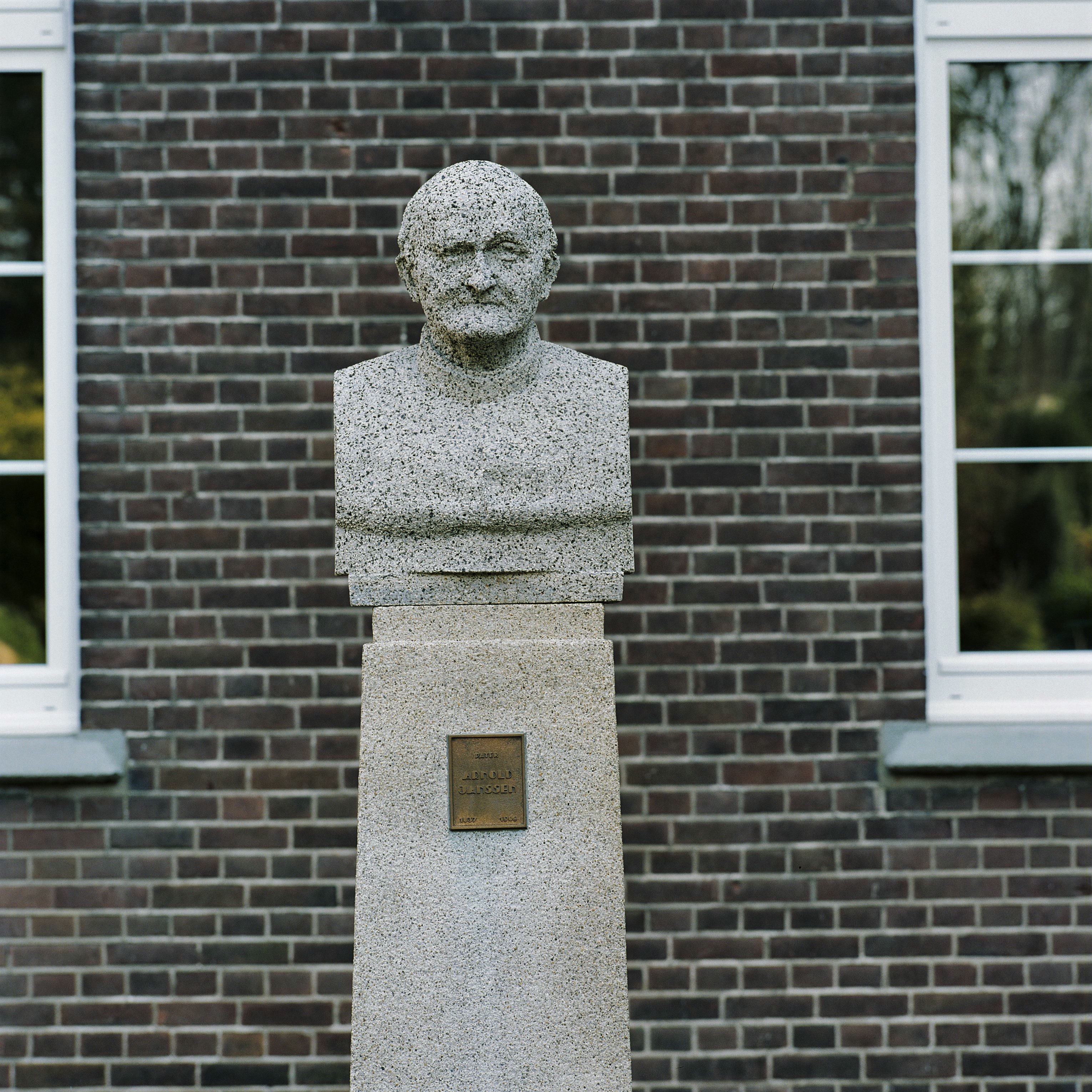 Klooster Van De Missiezusters: Borstbeeld van de stichter Arnoldus Janssen